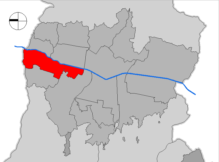 mapa de la comuna Castilla. Medellín, Colombia.